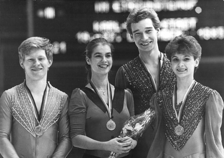 Eiskunstläufer, DDR ADN-ZB Thieme 21.12.1985 Karl-Marx-Stadt: DDR-Meisterschaften im Eiskunstlaufen.- Den DDR-Meistertitel und damit die begehrten Goldmedaillen erkämpften (vlnr) Falko Kirsten (SC Einheit Dresden) bei den Herren, die Olympiasiegerin, Welt- und Europameisterin Katarina Witt (SC Karl-Marx-Stadt) bei den Damen und Katrin Kanitz-Tobias Schröter (SC Dynamo Berlin) bei den Sportpaaren.